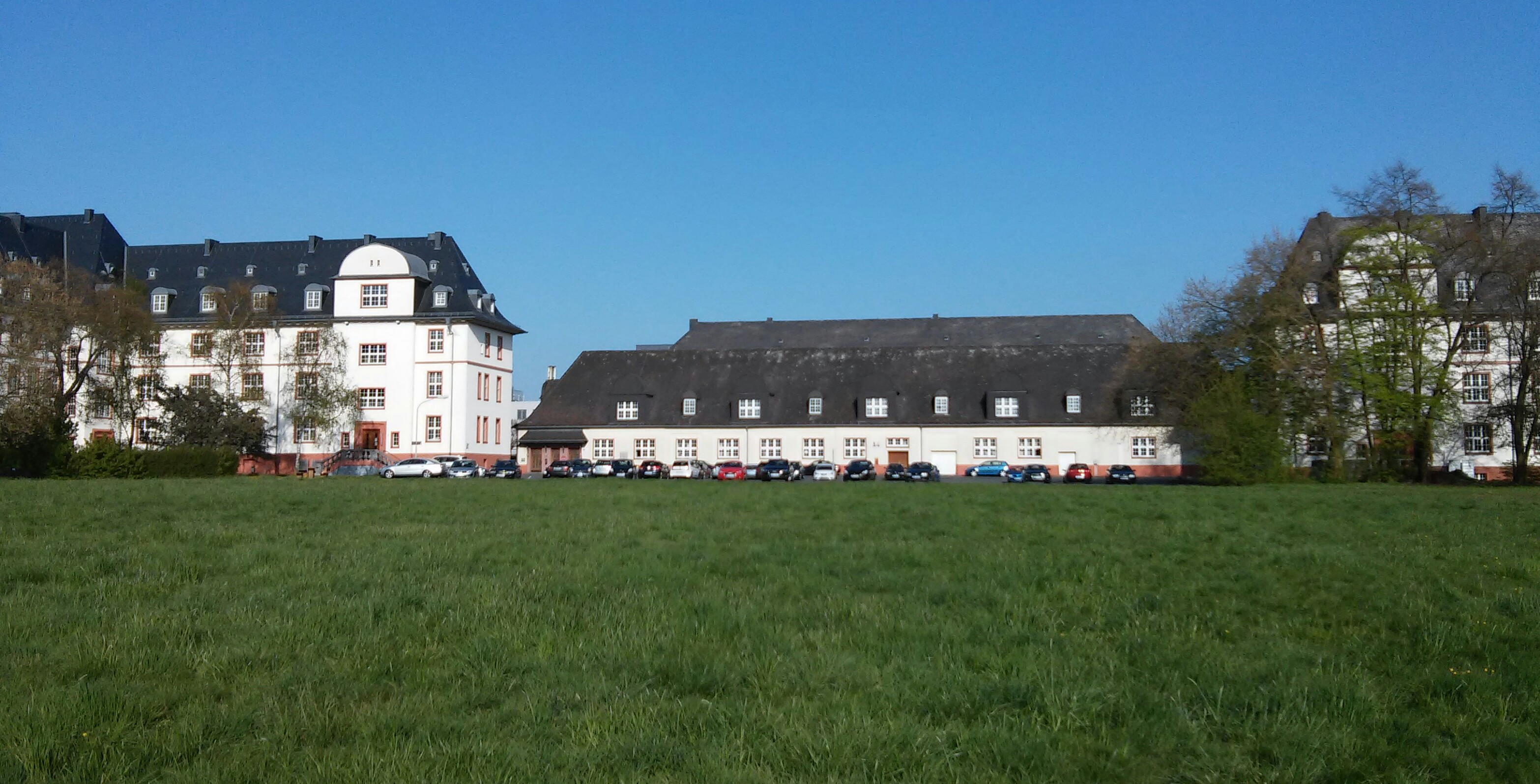 THM Campus Wetzlar, ehemalige Spilburg-Kaserne